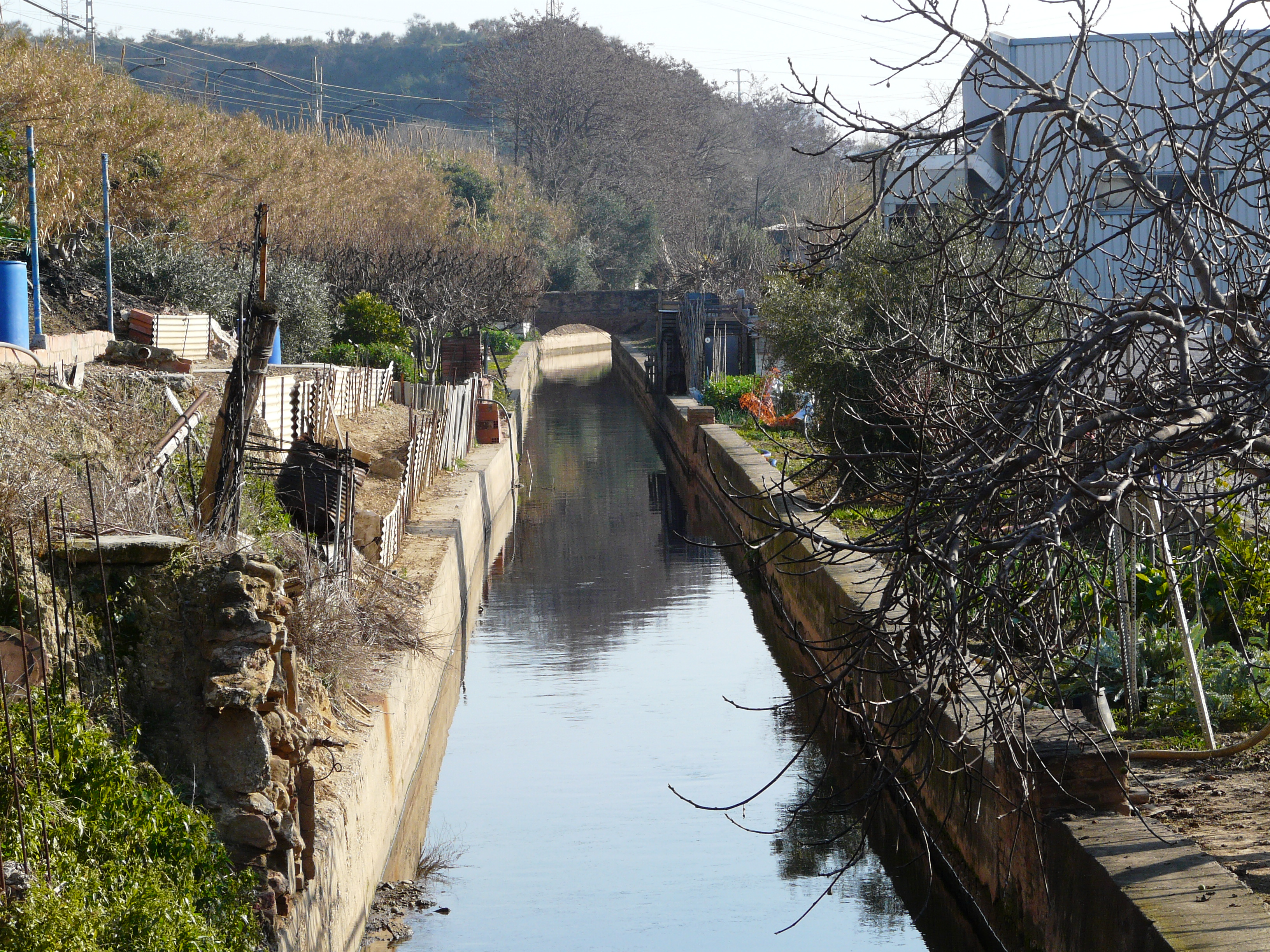 Serra de Collserola (Vallès Occidental, Baix Llobregat, Barcelonès) (Sant Cugat del Vallès, Barcelona, Cerdanyola del Vallès i altres). This is a a photo of a natural area in Catalonia, Spain, with id: ES510066 Object location41° 26′ 24″ N, 2° 06′ 36″ E